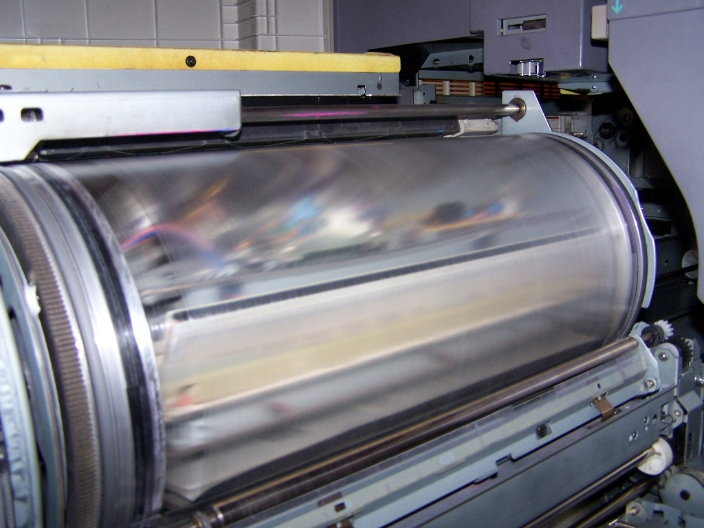 Transfertrommel eines Canon CLC Vollfarbsystems Sie wird im laufenden Betrieb elektrisch aufgeladen und durch diese Aufladung bleibt das Papier auf der Walze haften. Sie dreht sich in einem minimalen Abstand synchron zur Bildtrommel, ist jedoch stärker geladen. Die Tonerpartikel wandern von der Bildtrommel in Richtung Transfertrommel und da sich dazwischen das Papier befindet, haften die Partikel dort an. Die Transfertrommel besteht im wesentlichen aus einer dicken Kunststofffolie - ähnlich einem Klarsichtschnellhefter. Sie ist bewußt elastisch damit sie nachgibt, sollte sich das Papier zwischen Transfer- und Bildtrommel knüllen. Liegt das Papier nicht 100% an weil es z.B. einen kleinen Knick hat, dann bleibt es zwischen den beiden Trommeln hängen - es kommt zum Papierstau.